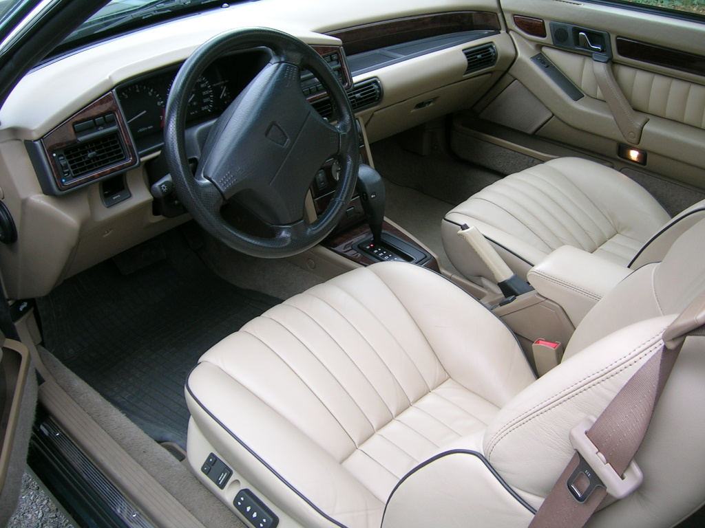 Rover 827 coupe interiør, 1995 modell